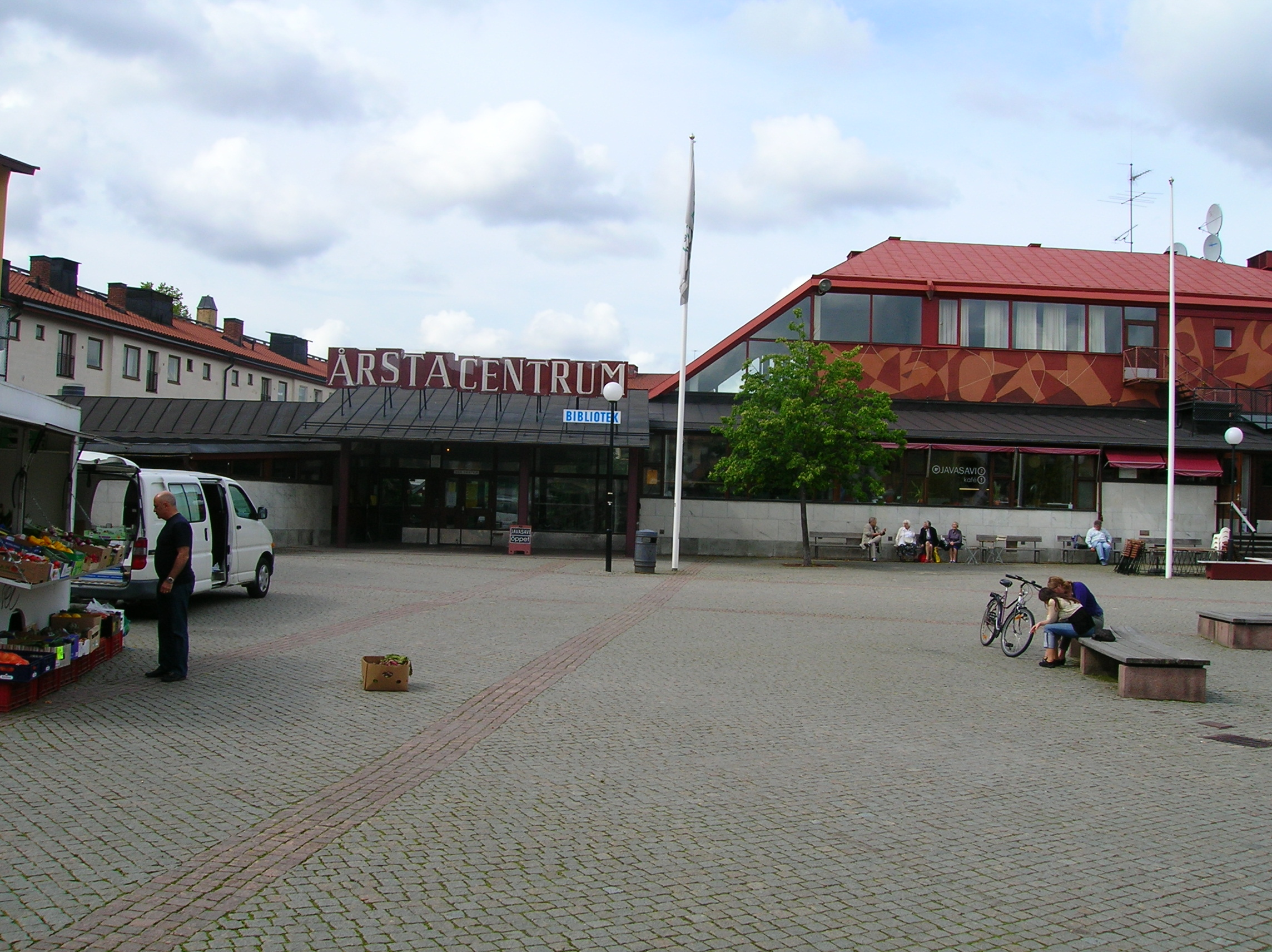 Årsta torg i Stockholm invigdes 1953 och formgavs av Erik och Tore Ahlsén. Här finns bl.a Folkets Hus, bibliotek och Vår Teater.